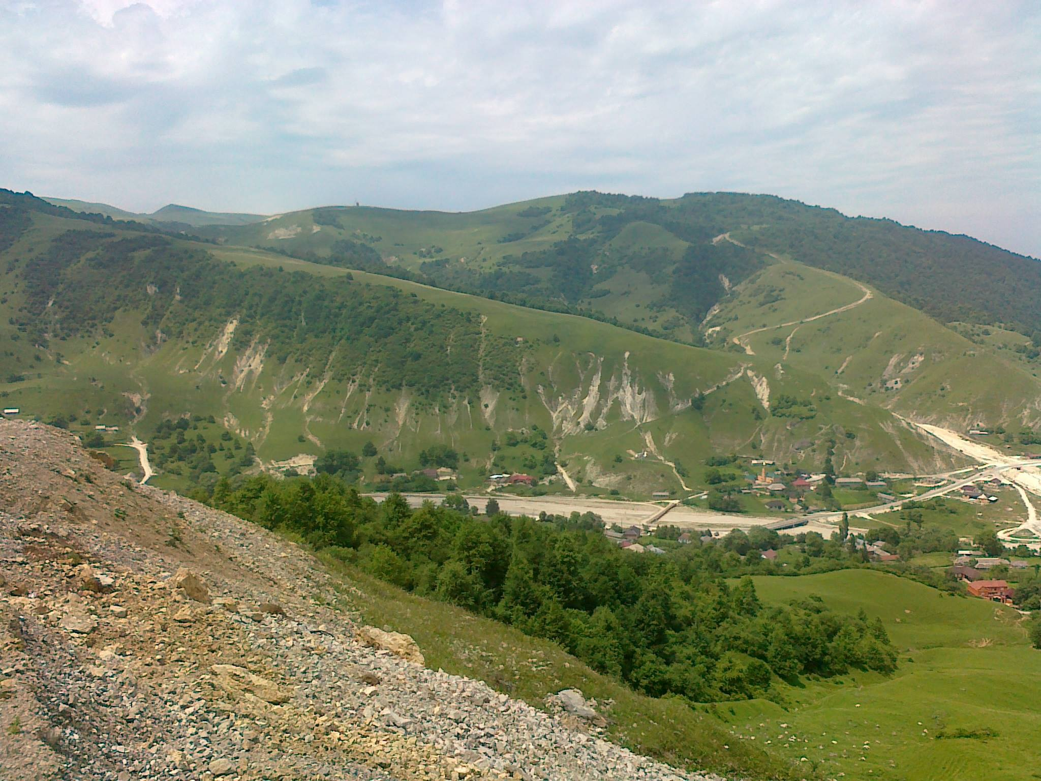 село Харачой